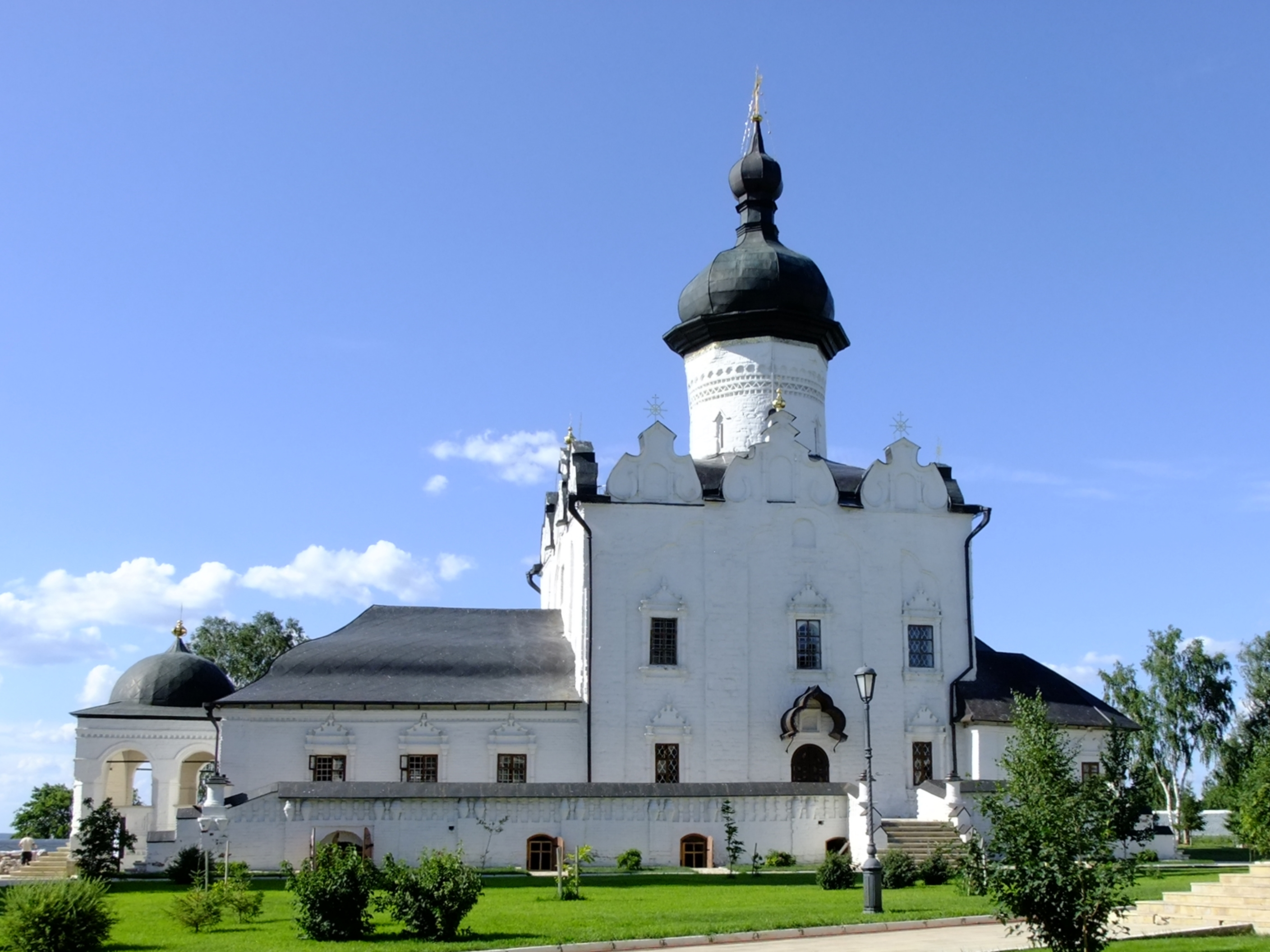 Успенский собор: Свияжск, Зеленодольский район, Татарстан